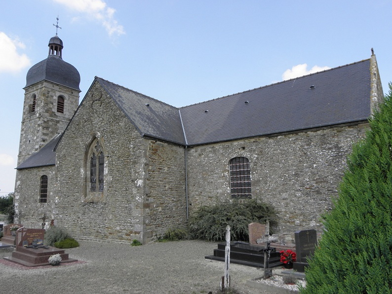 Église paroissiale Saint-Sulpice à Macey (50).